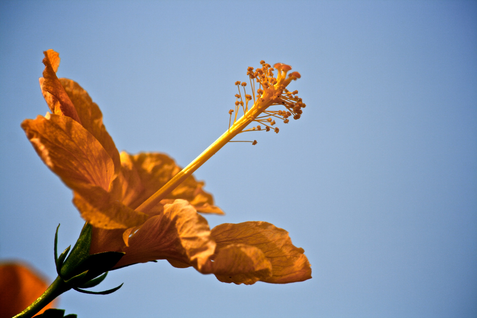 São Paulo - SP